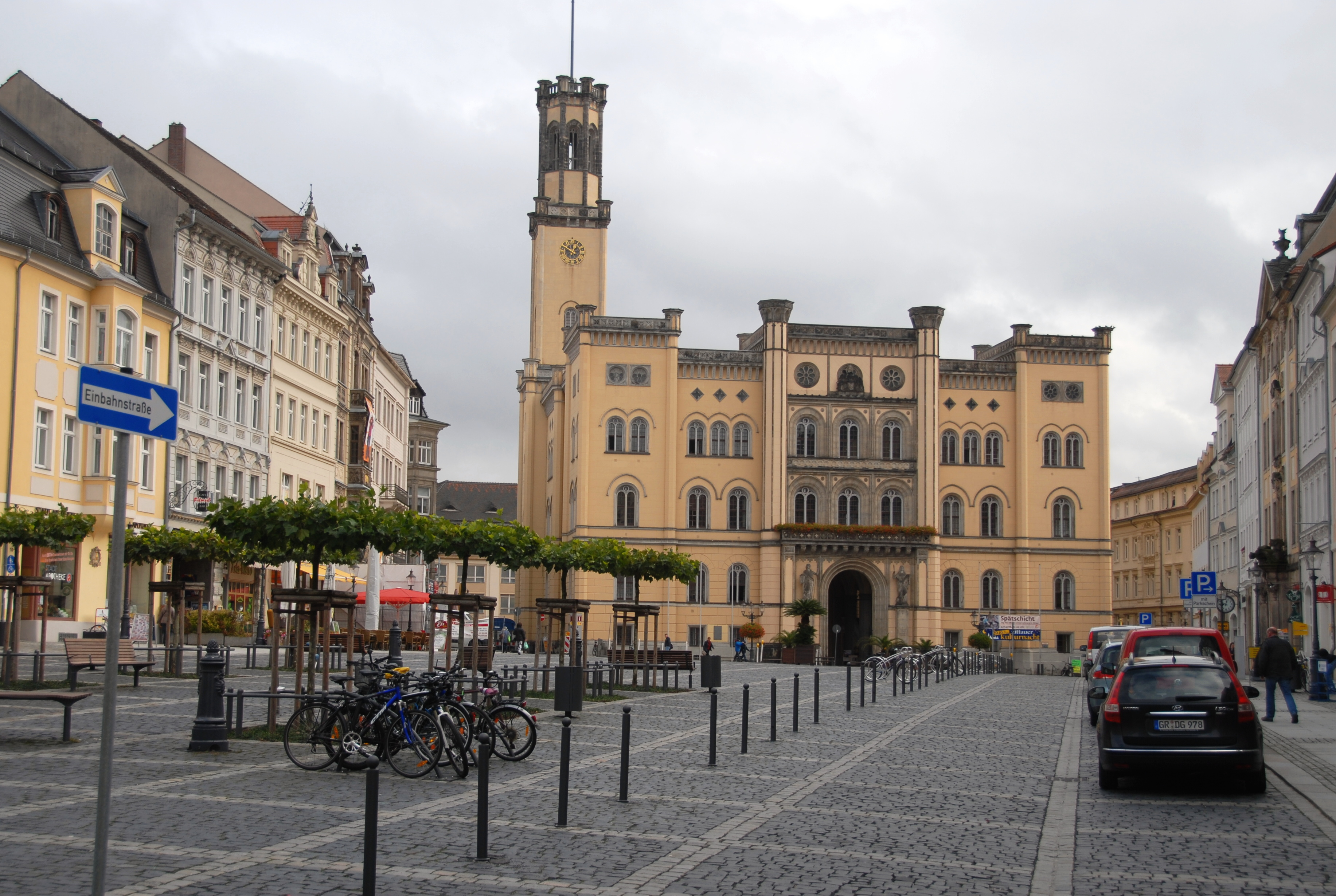 Neu sanierter Marktplatz mit Rathaus